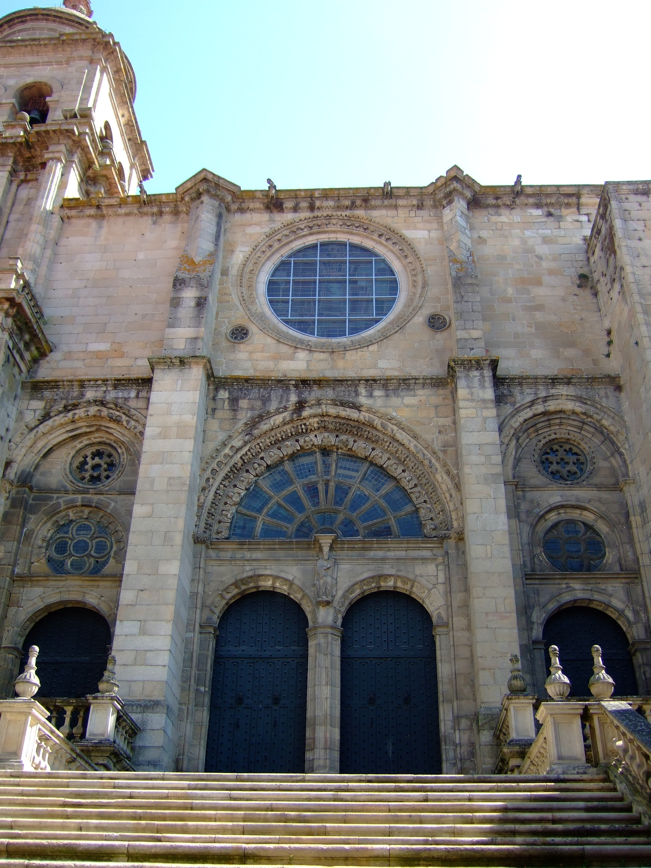 Iglesia Catedral de San Martín - Ourense - Galicia - Spain